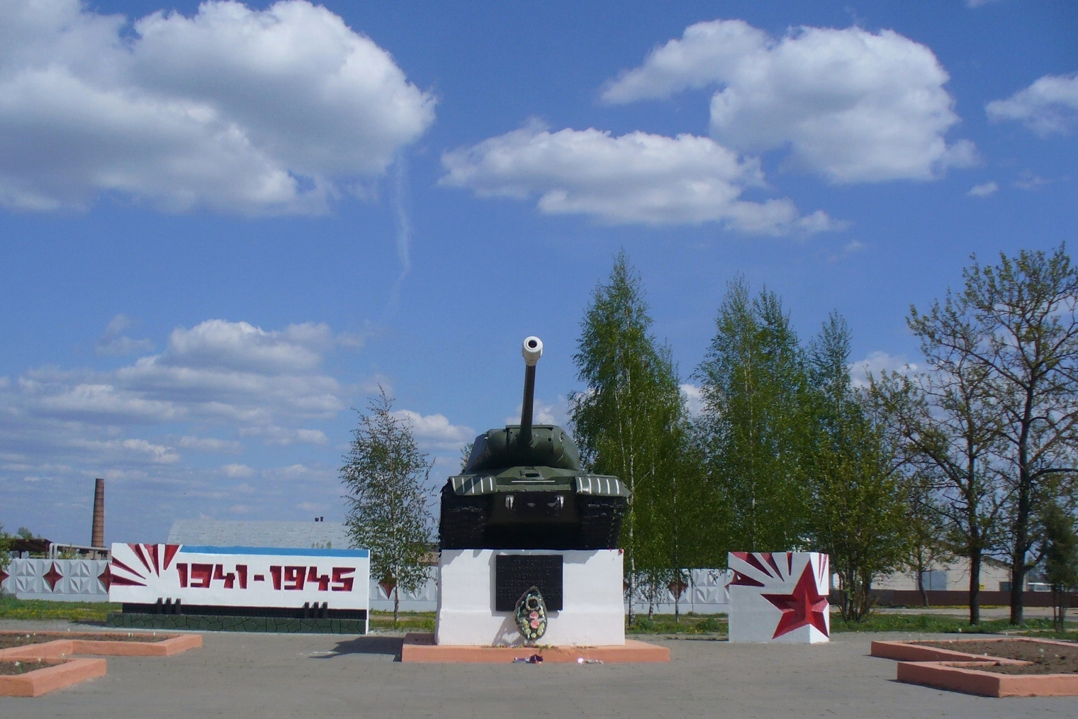 Воинам танкистам, участникам освобождения города Городка